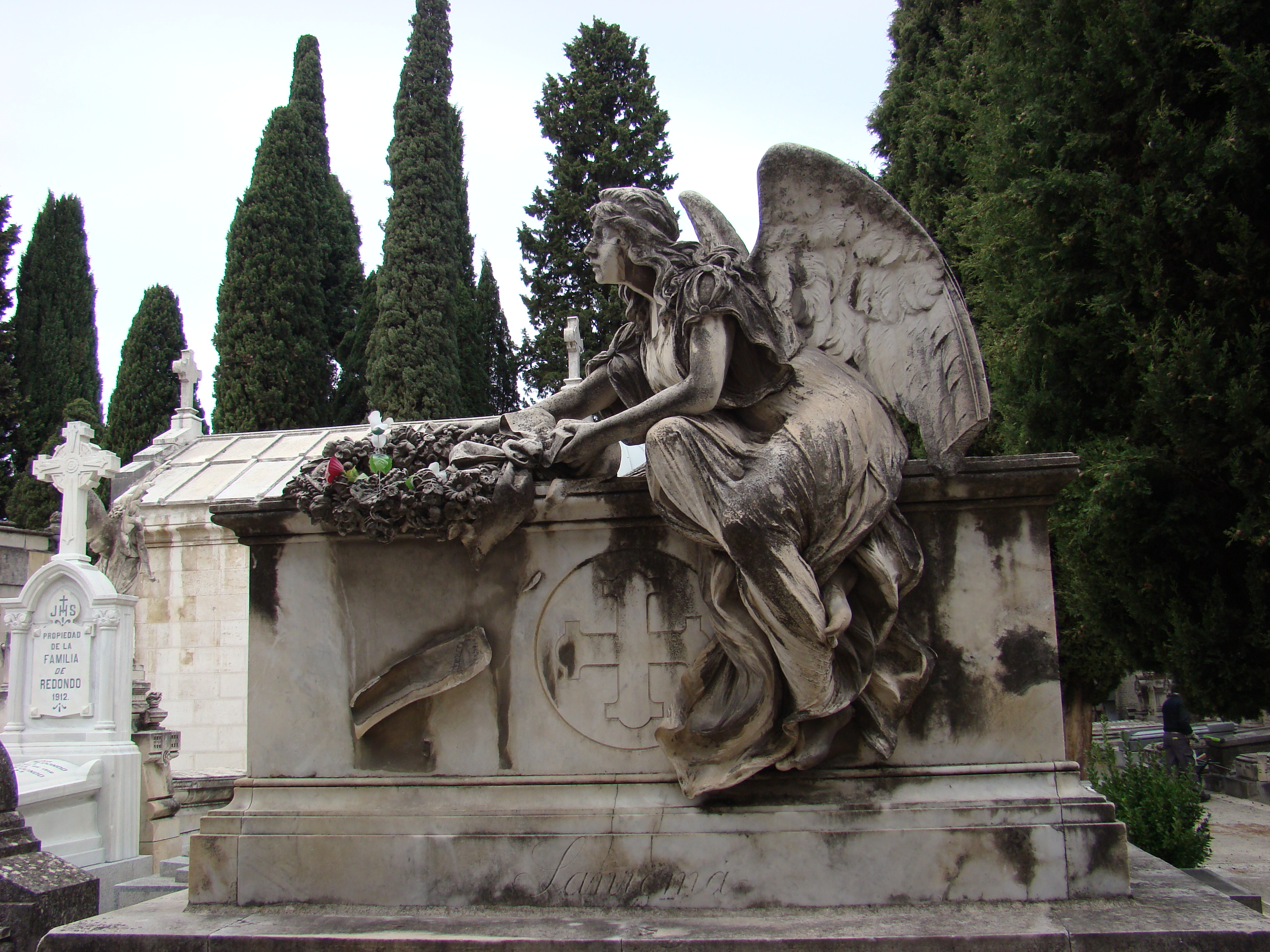 Patio de Santa Gertrudis Se dice que la escultura fue realizada en Florencia y transportada a la sacramental. Joaquín Sanromá Creus (Barcelona 1828-Madrid 1895), economista y diputado liberal, abolicionista. Casado con Hortensia Catalá. Sus memorias (2 tomos de cerca de 1000 páginas cada uno) pueden leerse en DSC00472